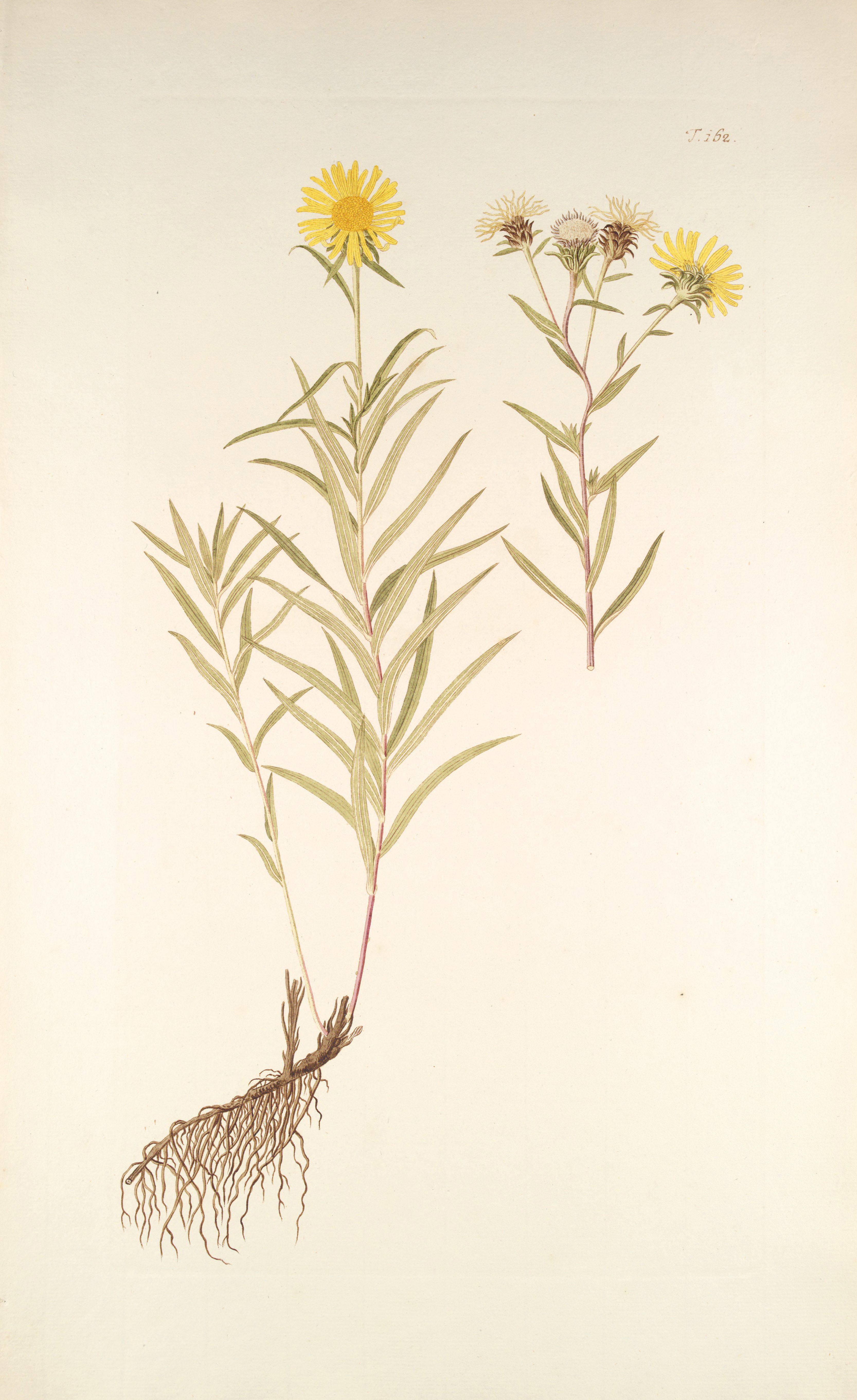 Legende: Ganze Pflanze. Oberer Teil einer teilweise schon fruchtenden Pflanze.